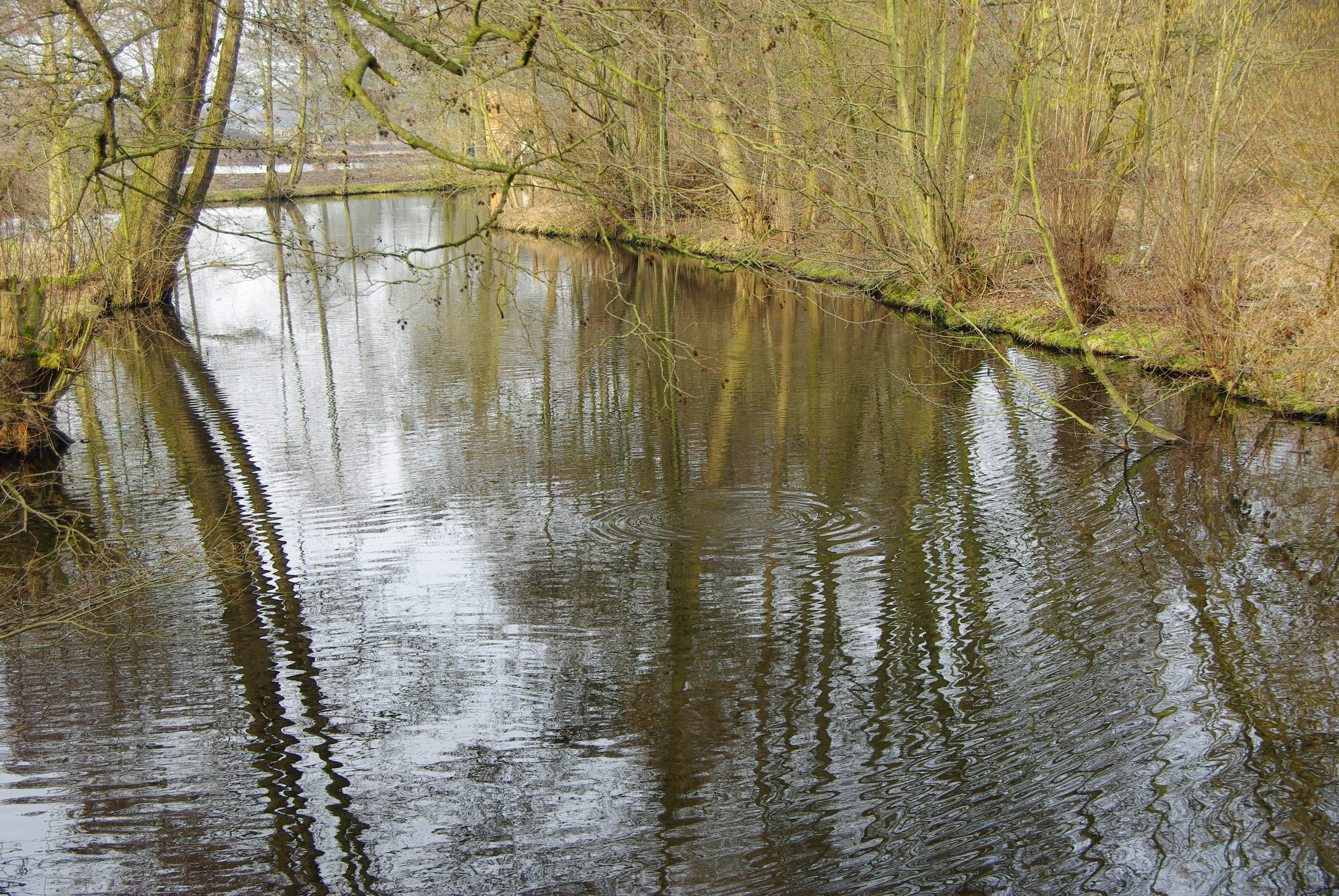 Nette im NSG „Krickenbecker Seen und Kleiner De Wittsee“